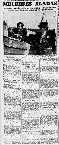 Parte do jornal A NOITE que mostra uma matéria em que Anésia Pinheiro Machado está envolvida